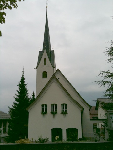 reformierte Kirche Untervaz, Kanton Graubünden